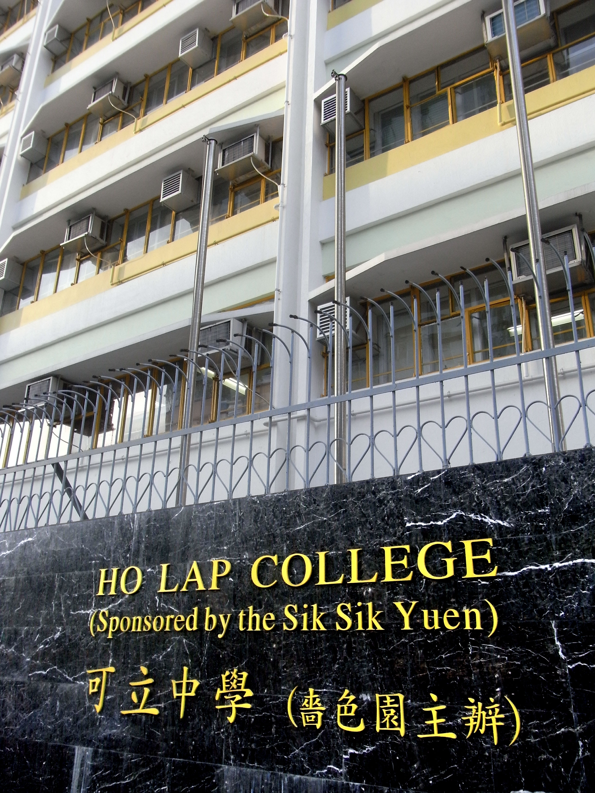 香港新蒲崗爵祿街，可立中學（嗇色園主辦）